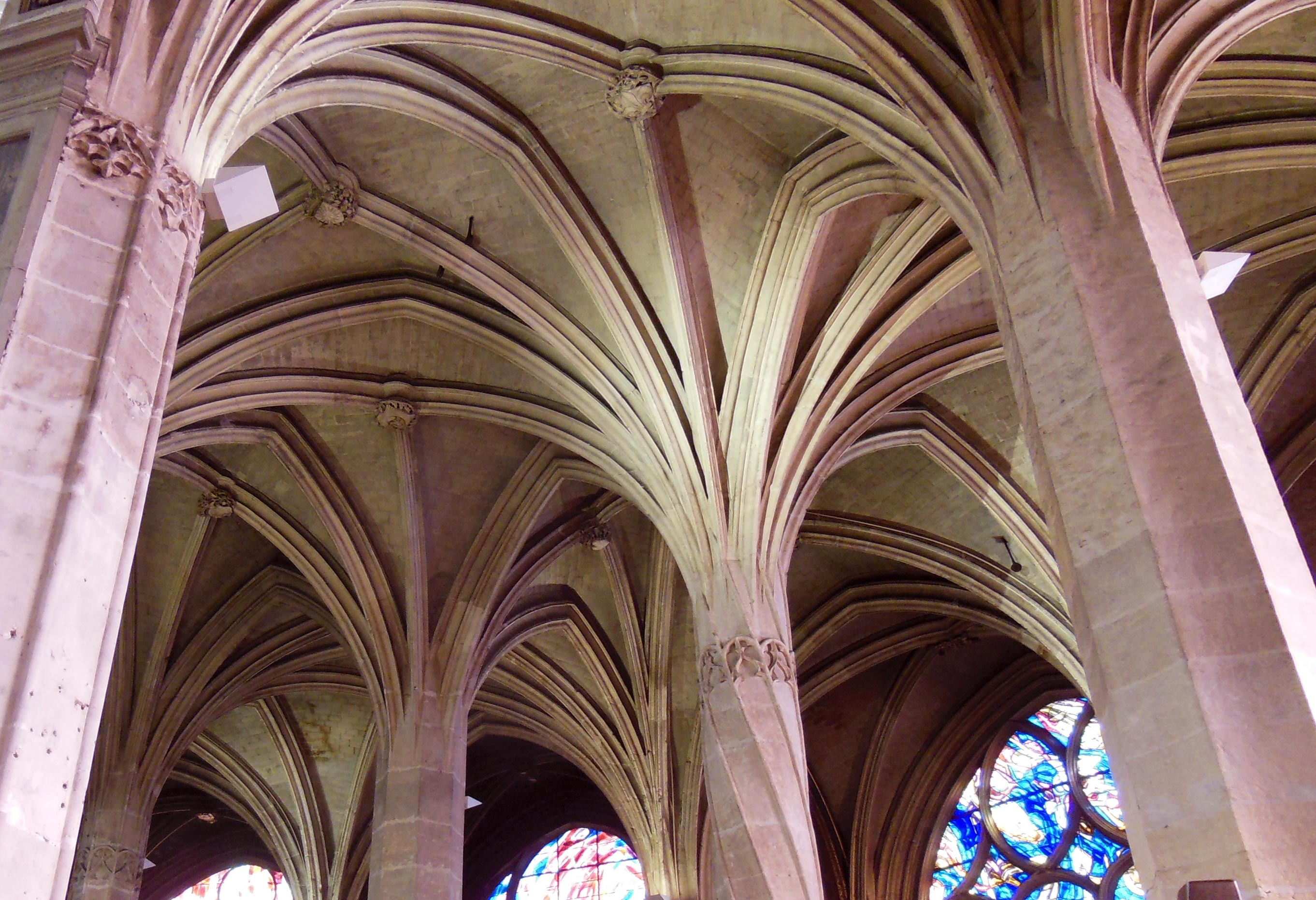 Francia, Parigi, chiesa di Saint Séverin, deambulatorio, pilastro e volta